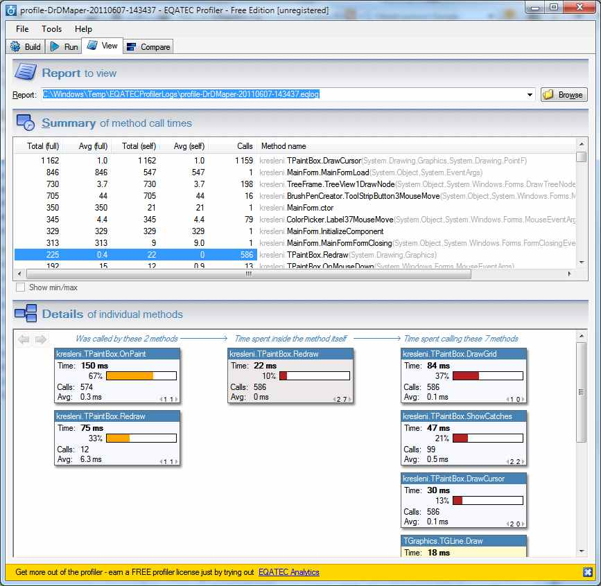 screenshot profileru